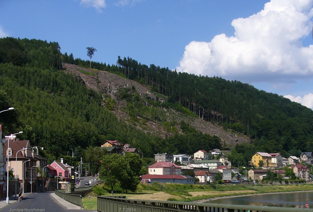 Východní stráň Papertského vrchu.